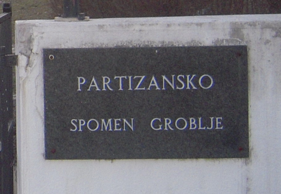 Табла_на_улазу_у_Партизанско_спомен_гробље_у_Бањалуци